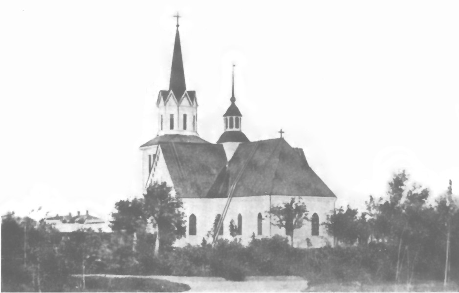 Umeå gamla kyrka (The old church of Umeå)